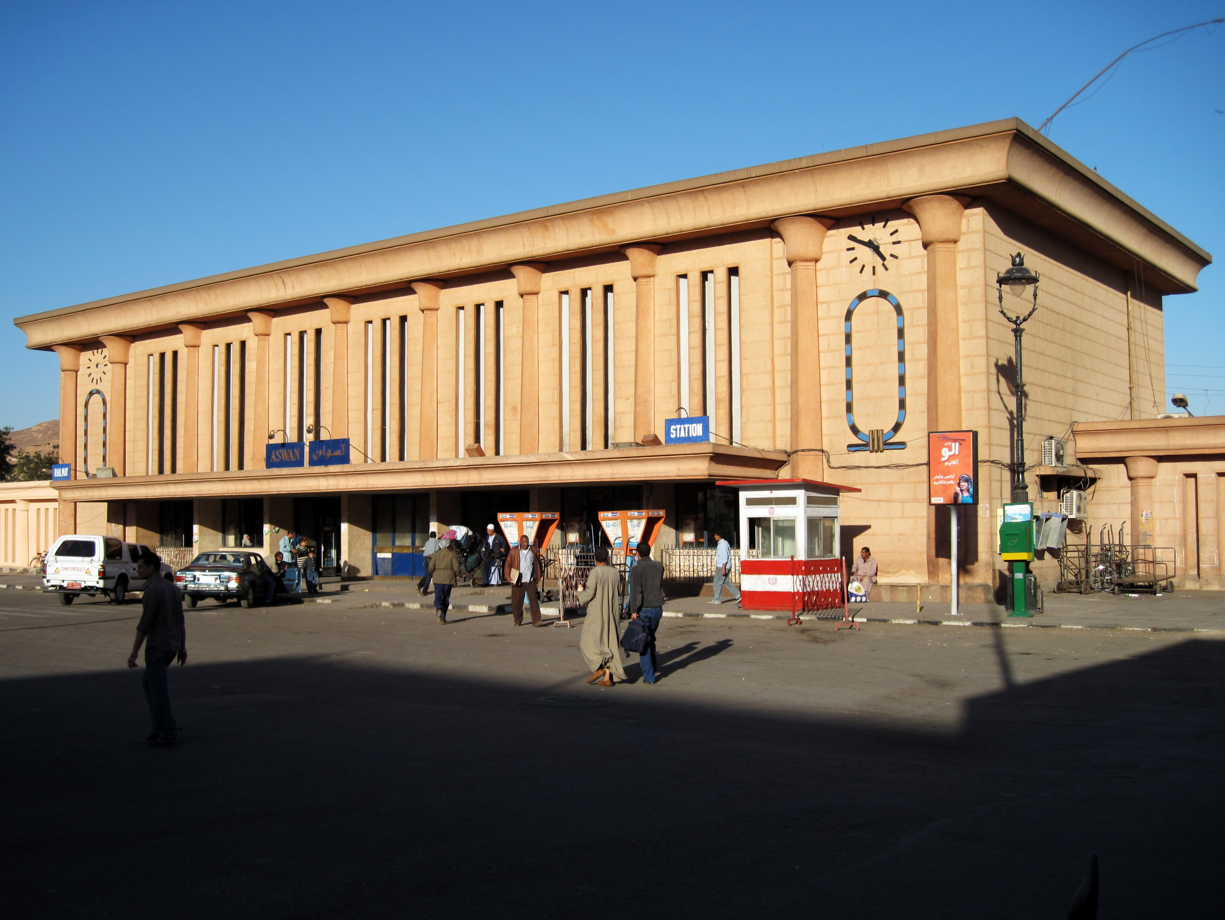 Bahnhofsgebäude von Assuan, Ägypten